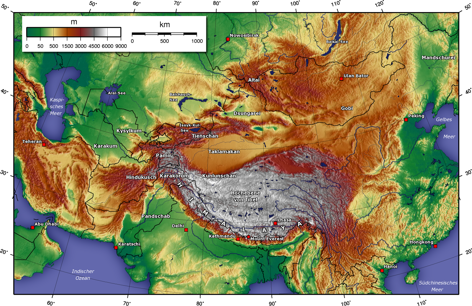 Topografische Karte von Zentralasien